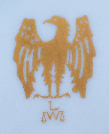 Sigle de la Maison Warin Rapeaud, verreries, avec un aigle doré, et les lettres LW, avec une balance.